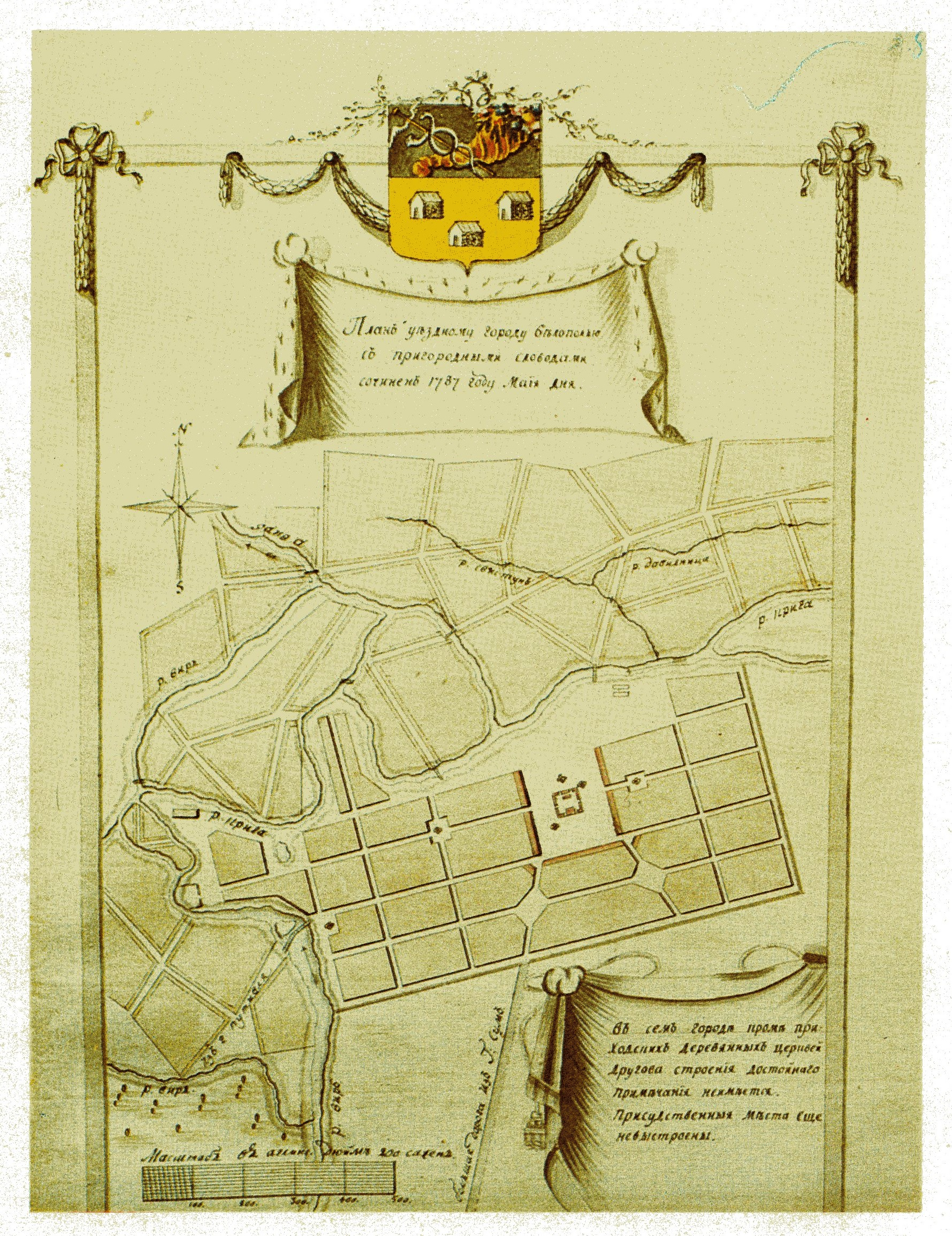 План уездного города Белополье в "Топографическом описании Харьковского наместничества" 1787 года. Оригинал. Подпись: «План уездному городу Белополью с пригородными слободами сочинен 1787 году … Маия … Дня».